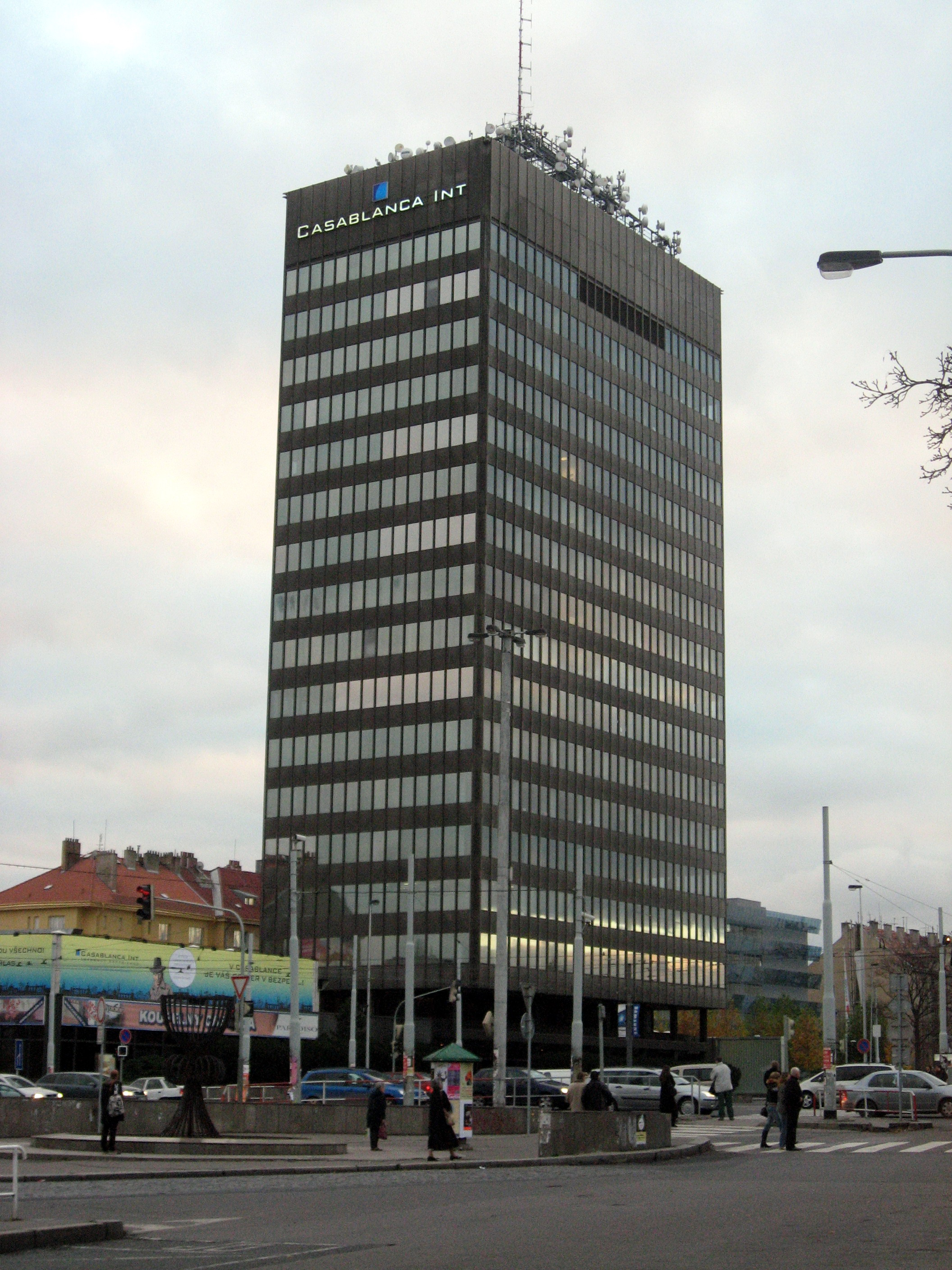 Budova Strojimportu